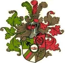 Vollwappen der Landsmannschaft Guilelmia Berlin